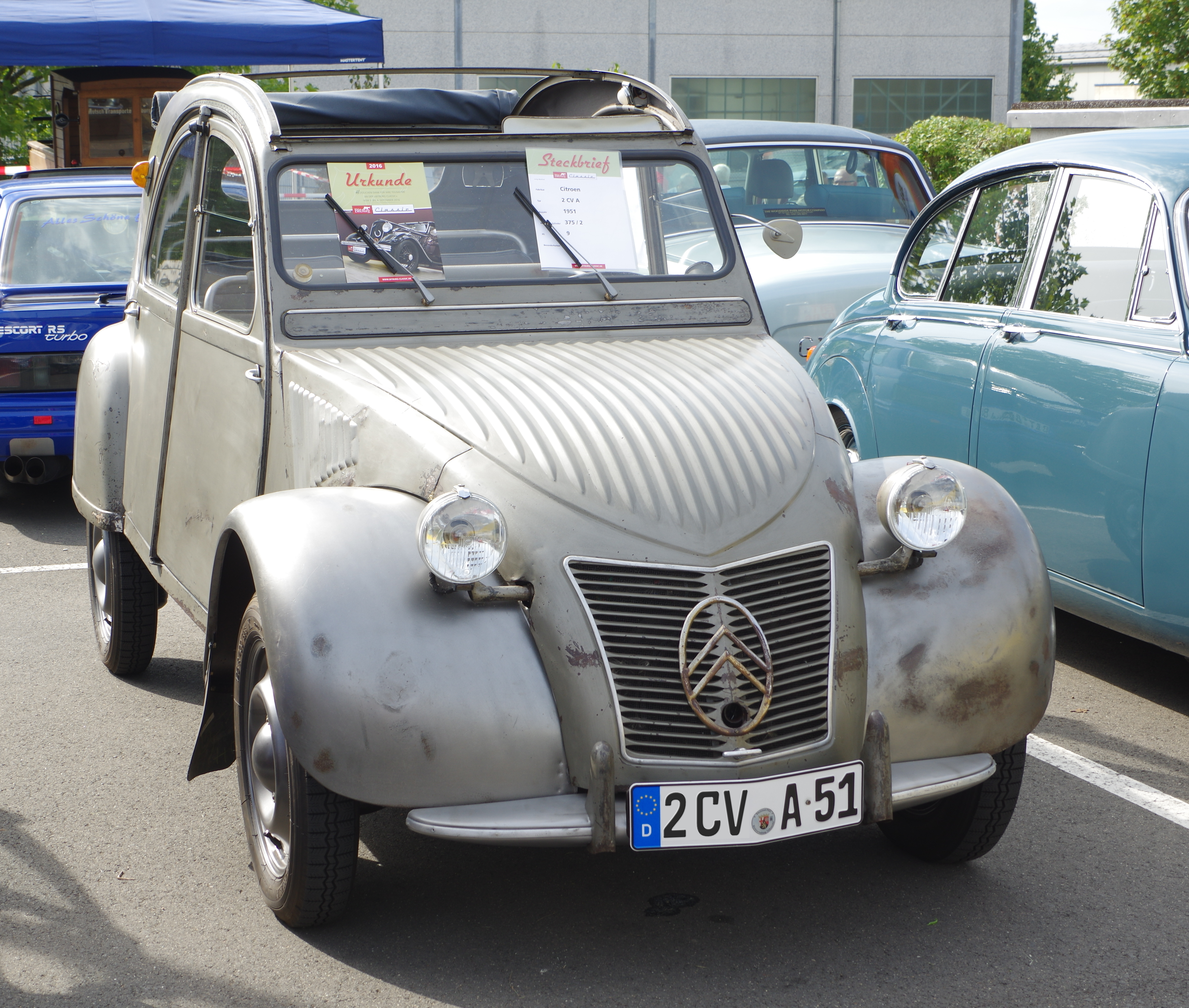 Citroën 2 CV A, 1951, 375 cm³, 2 Zyl., 9 PS , Bitburg Classic 2016, Das Nummernschild ist verfälscht!